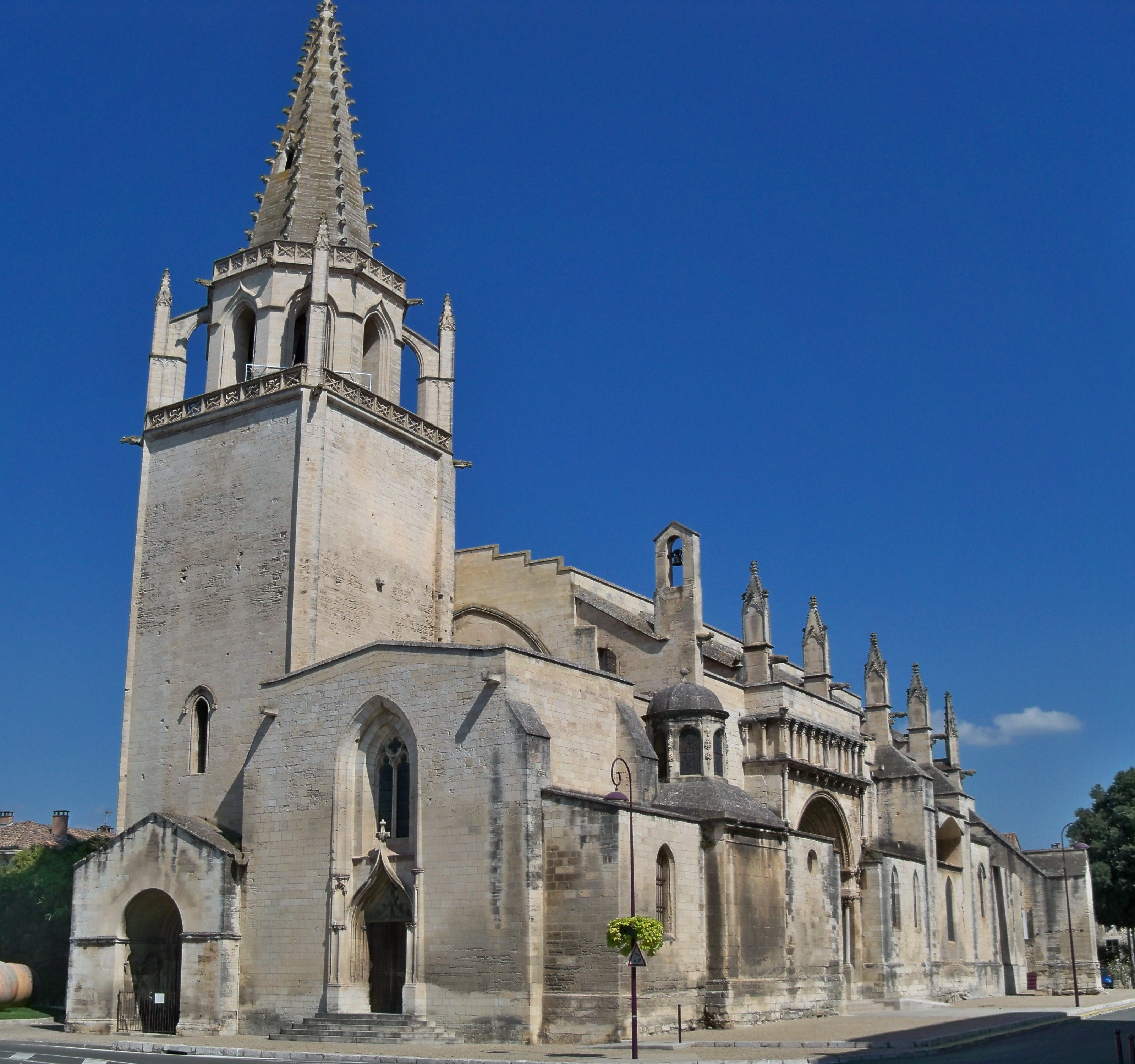 Collégiale royale Sainte Marthe de Tarascon (13) .